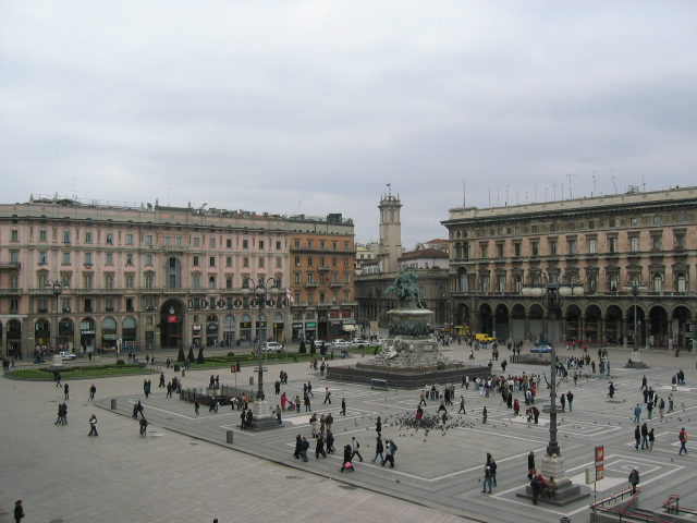 Palazzo Carminati (a sinistra) e Palazzo Haas in Piazza Duomo a Milano.